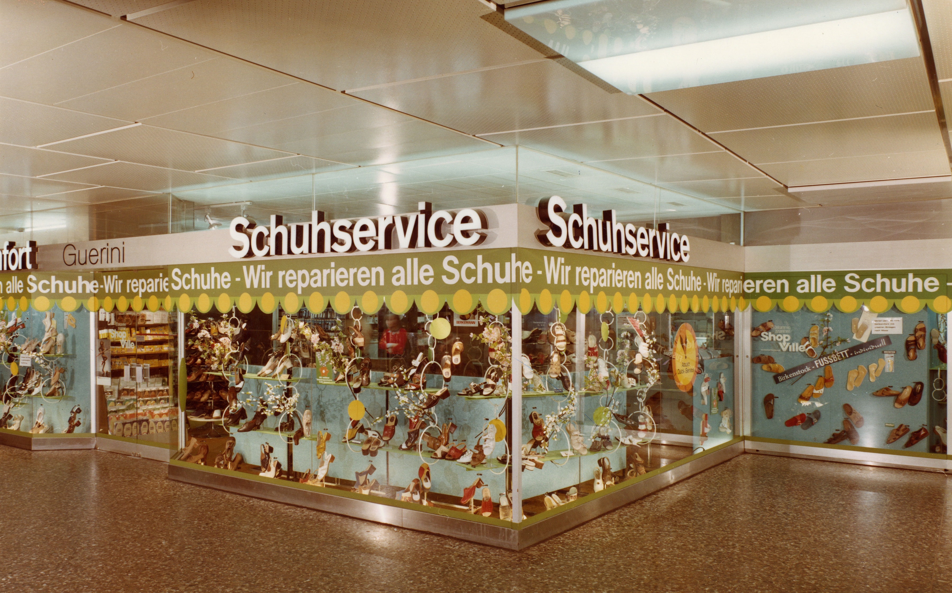 Zürich Hauptbahnhof, früheres Erscheinungsbild des Shopville